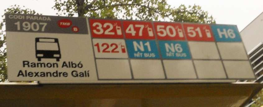 Parada d'utobús urbà de Barcelona